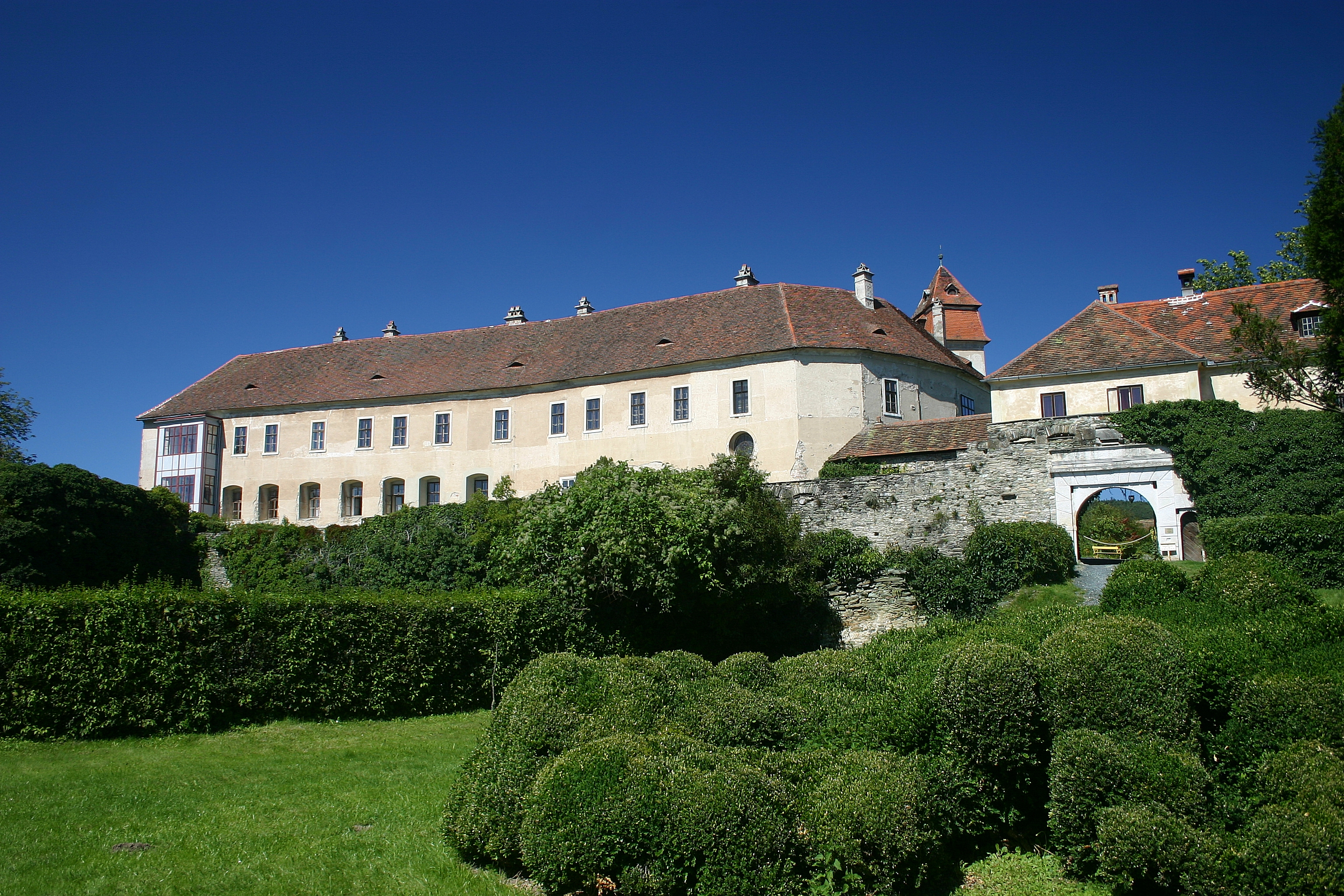 Bernstein im Burgenland Burg (Bild 2) – Ansicht von Südwesten